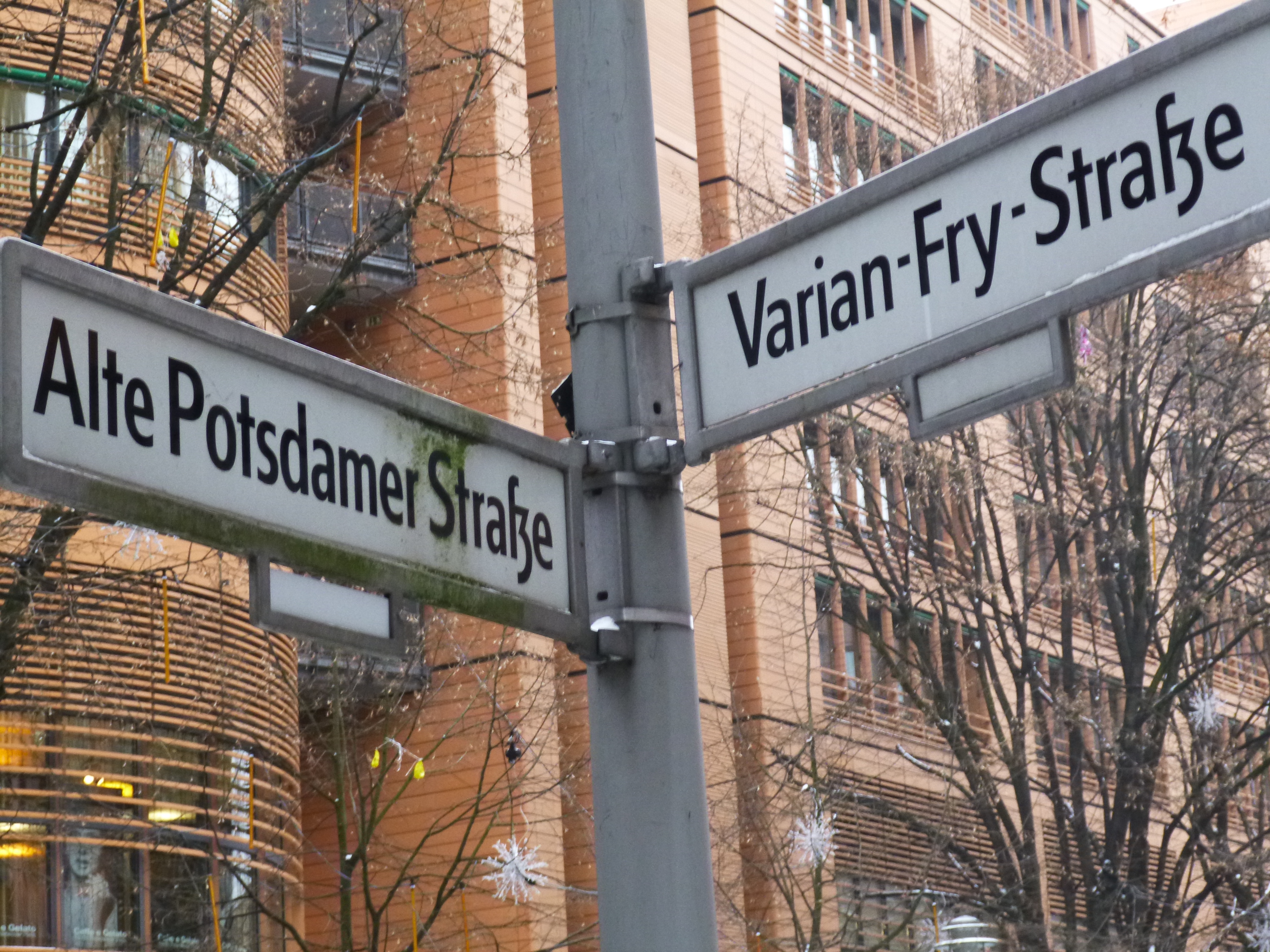 Berlin-Tiergarten Varian-Fry-Straße Ecke Alte Potsdamer Straße